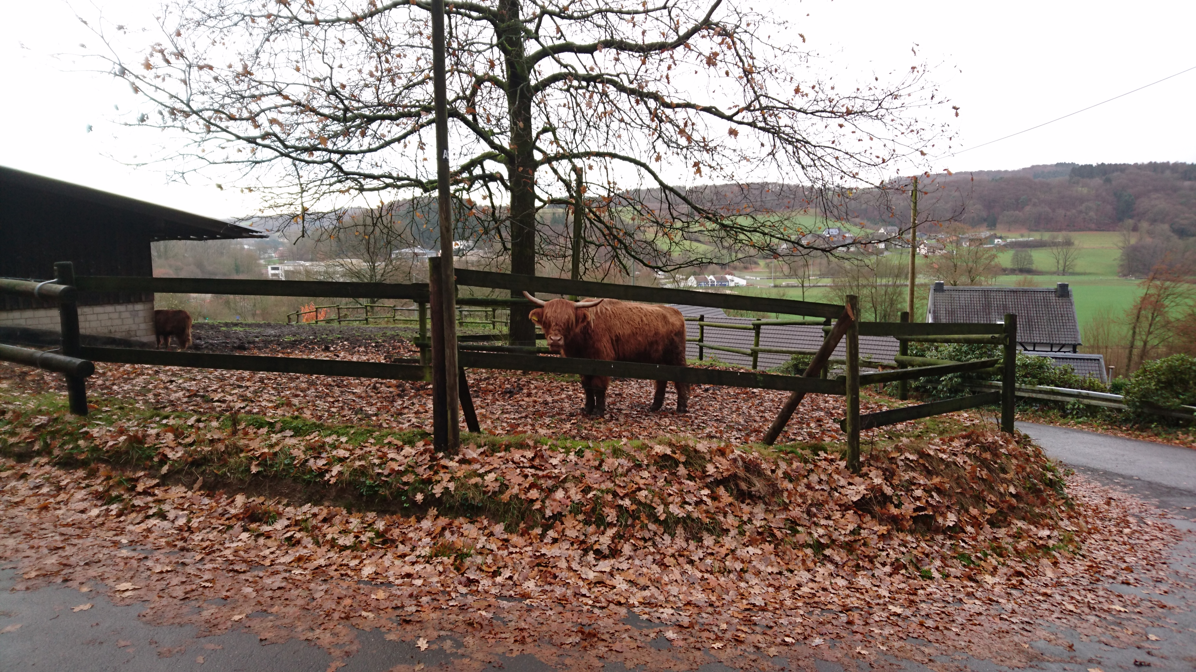 Hochlandrind in Brambach (Overath)